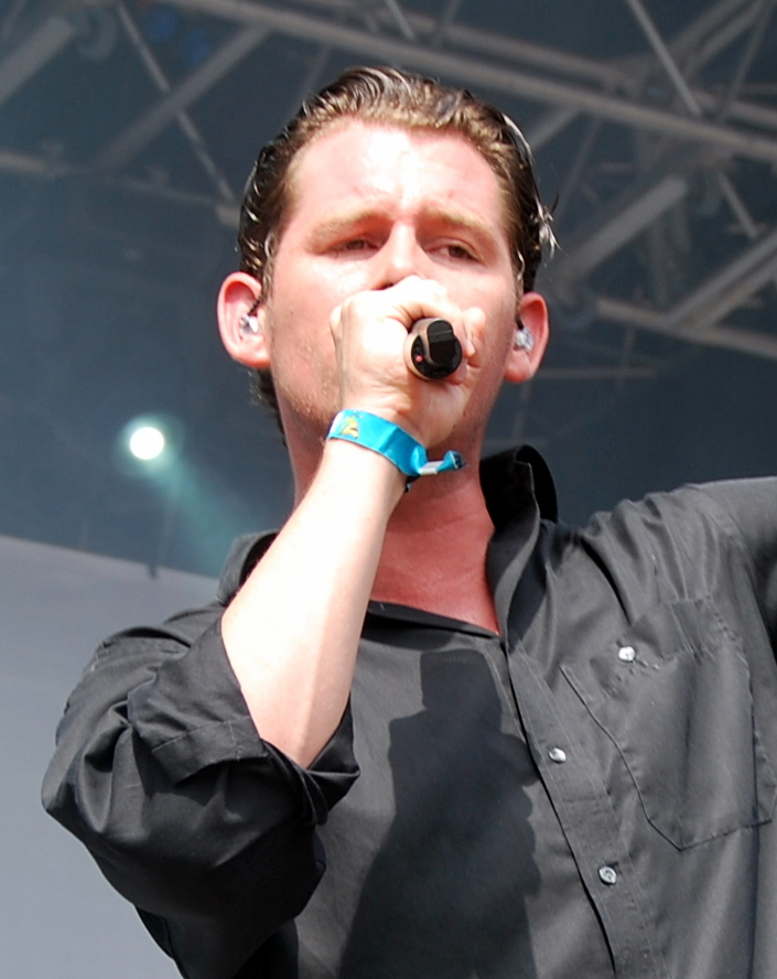 Rasmus Seebach under sin koncert på Vig Festival 2010.